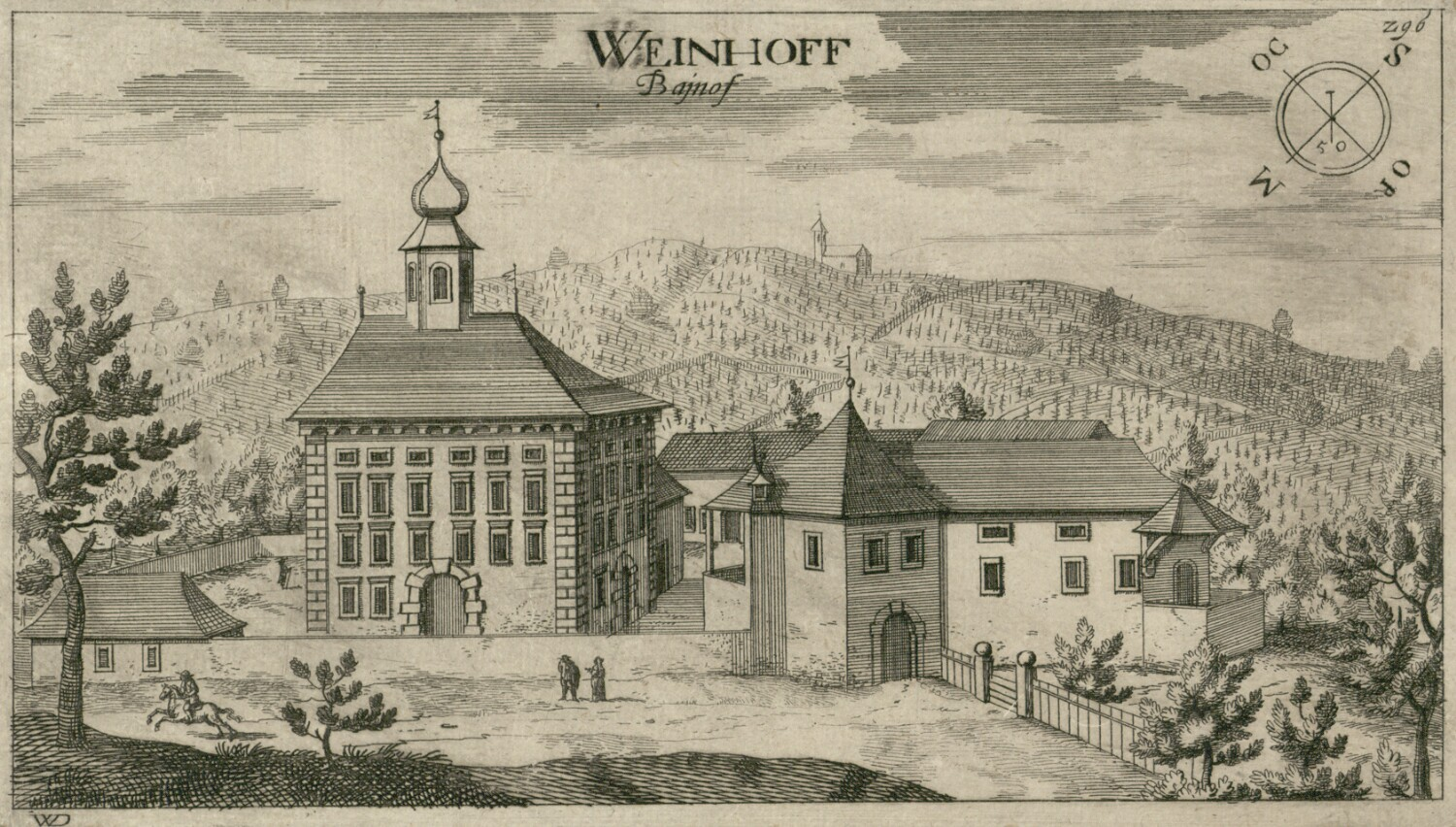 Dvorec Bajnof